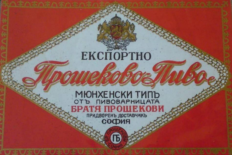 Етикет на Прошеково пиво